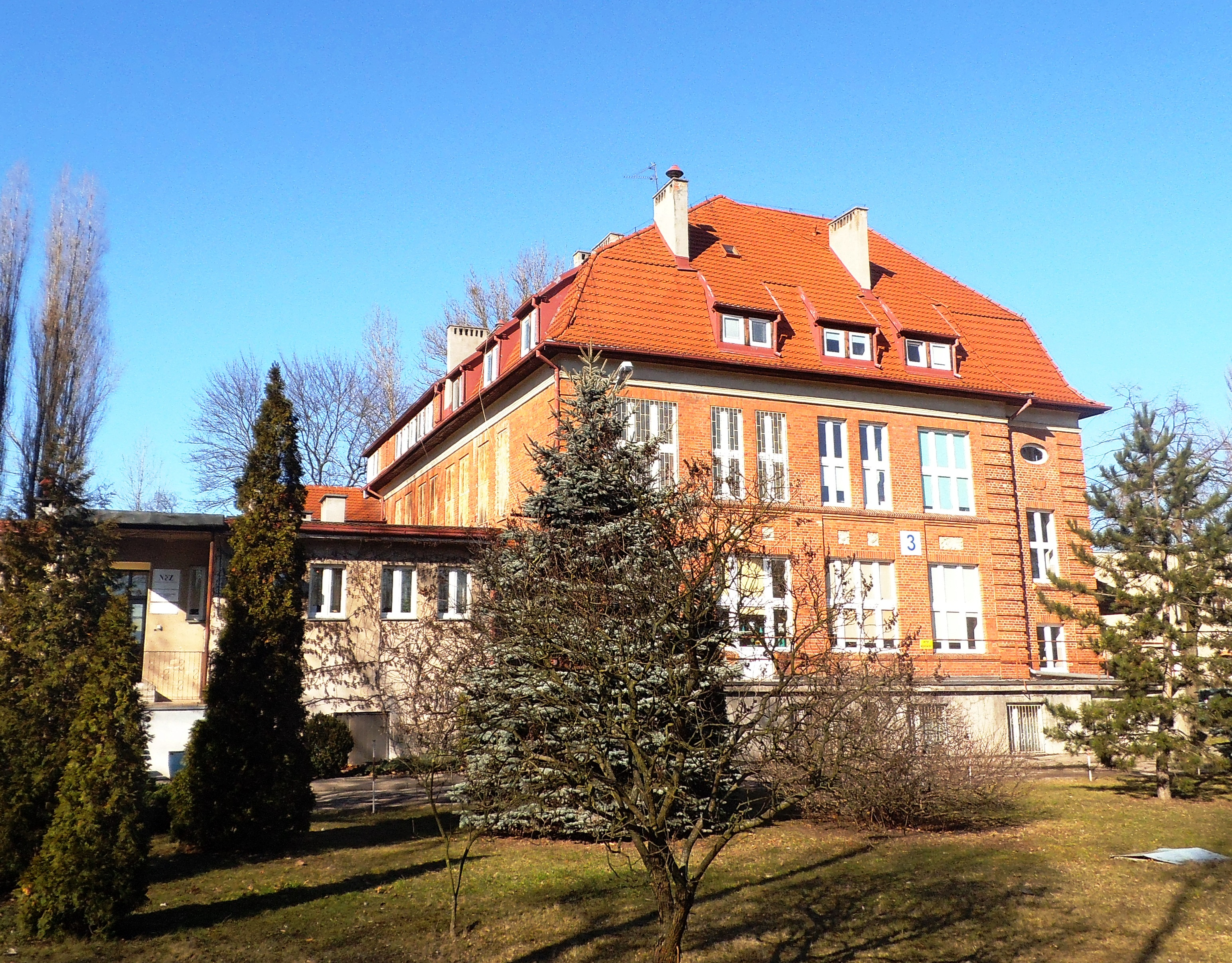 Budynek Szpitala Psychiatrycznego w Toruniu